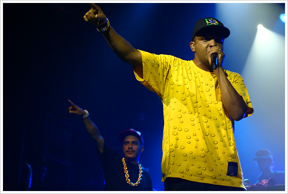 Marcelo D2 e Fernandinho ao vivo em Niceto, Buenos Aires Valeu galera!